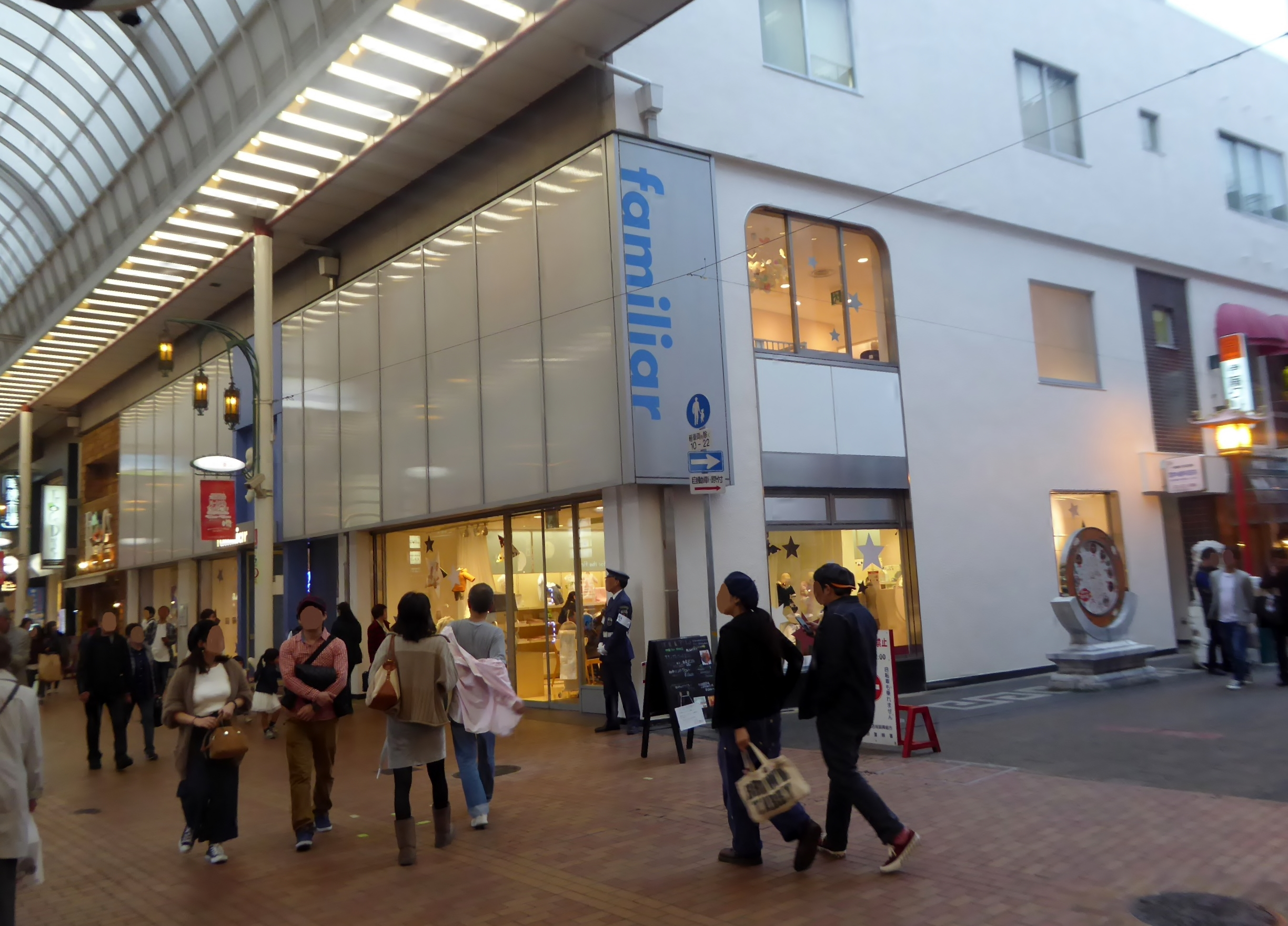 ファミリア神戸元町本店を撮影。